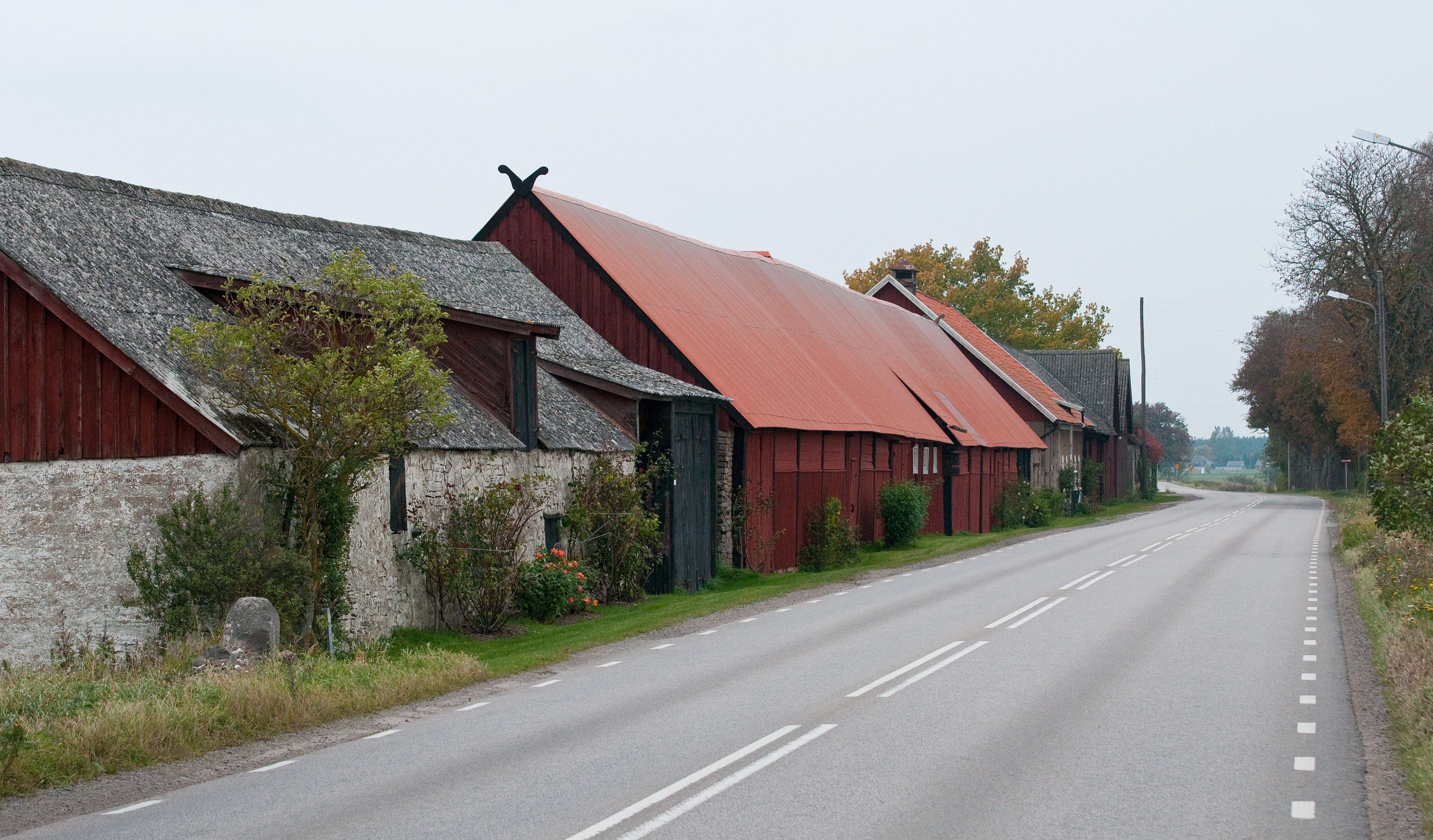 Lilla Frö radby i Resmo socken och Mörbylånga kommun